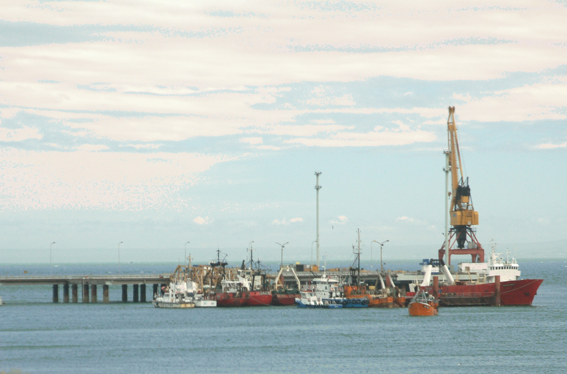 Puerto San Antonio Este, San Antonio, Río Negro Province